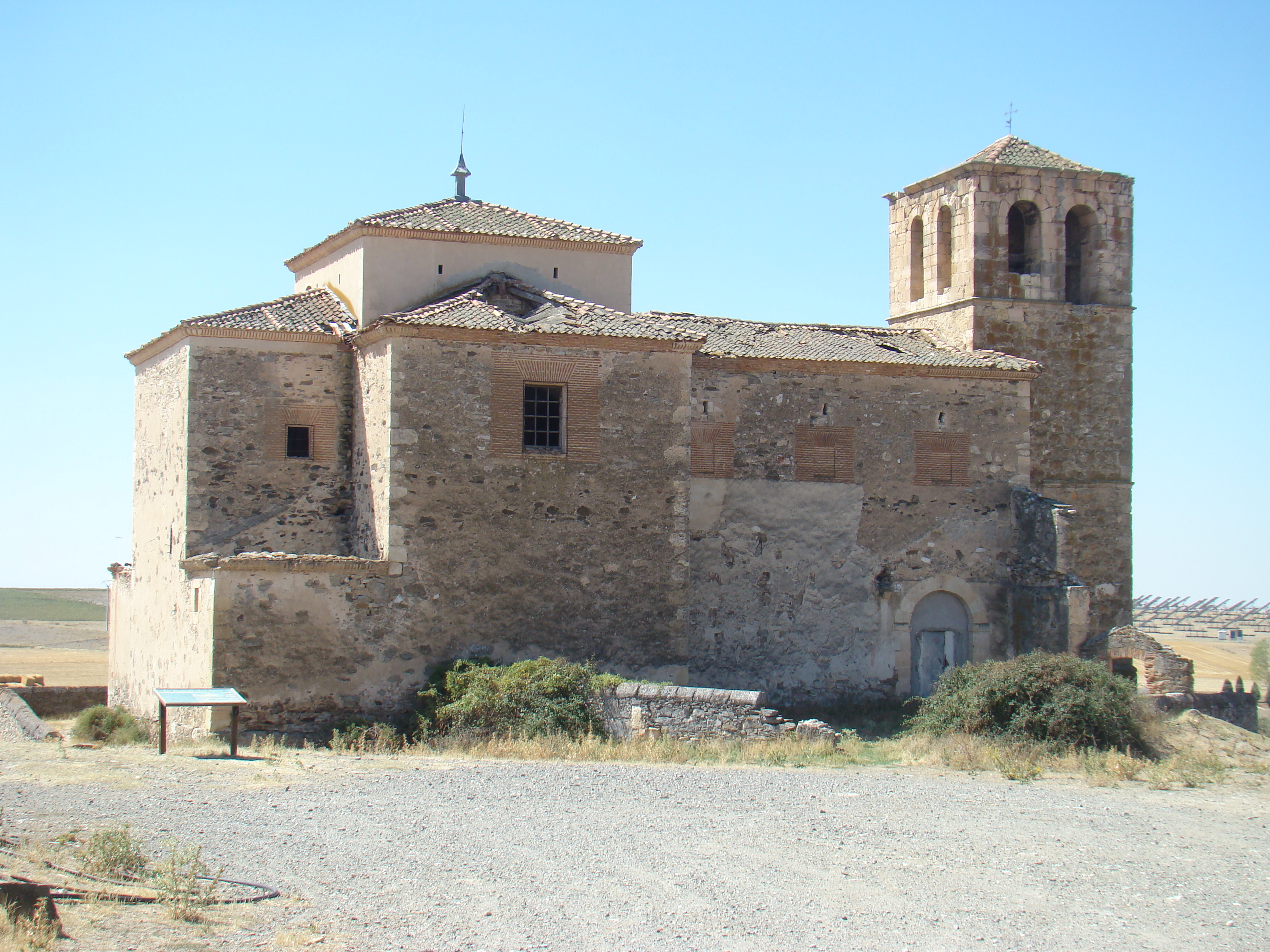 Segovia, España. Despoblado de Fuentes. Iglesia parroquial de la Asunción.